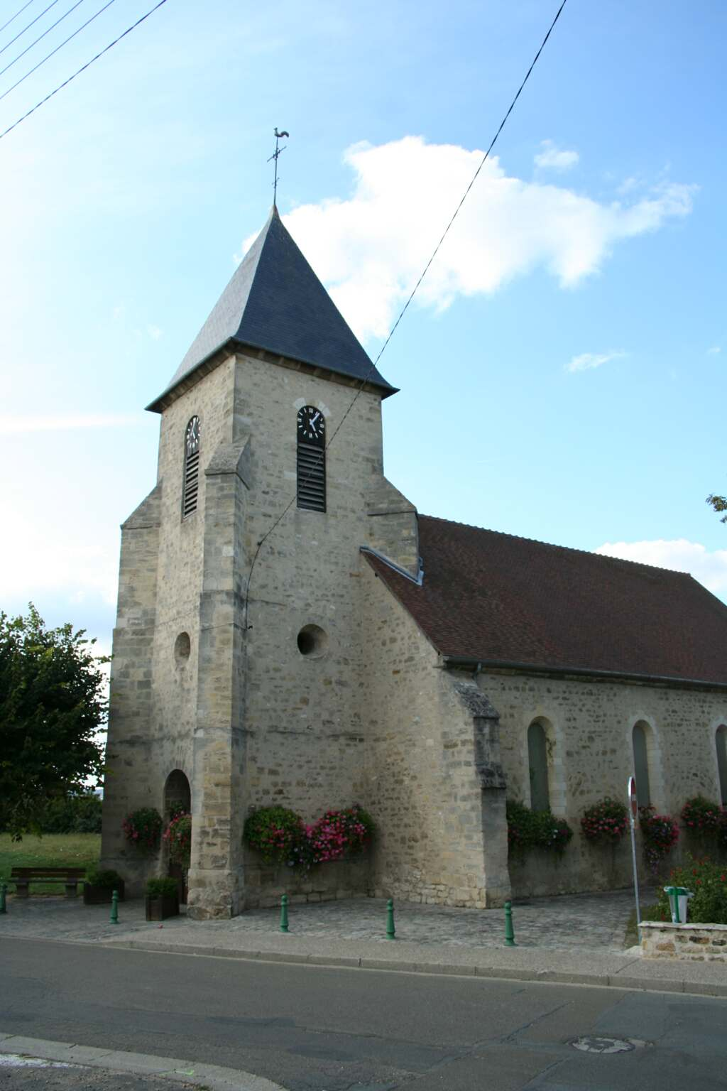 Église de Bouafle - Yvelines (France)